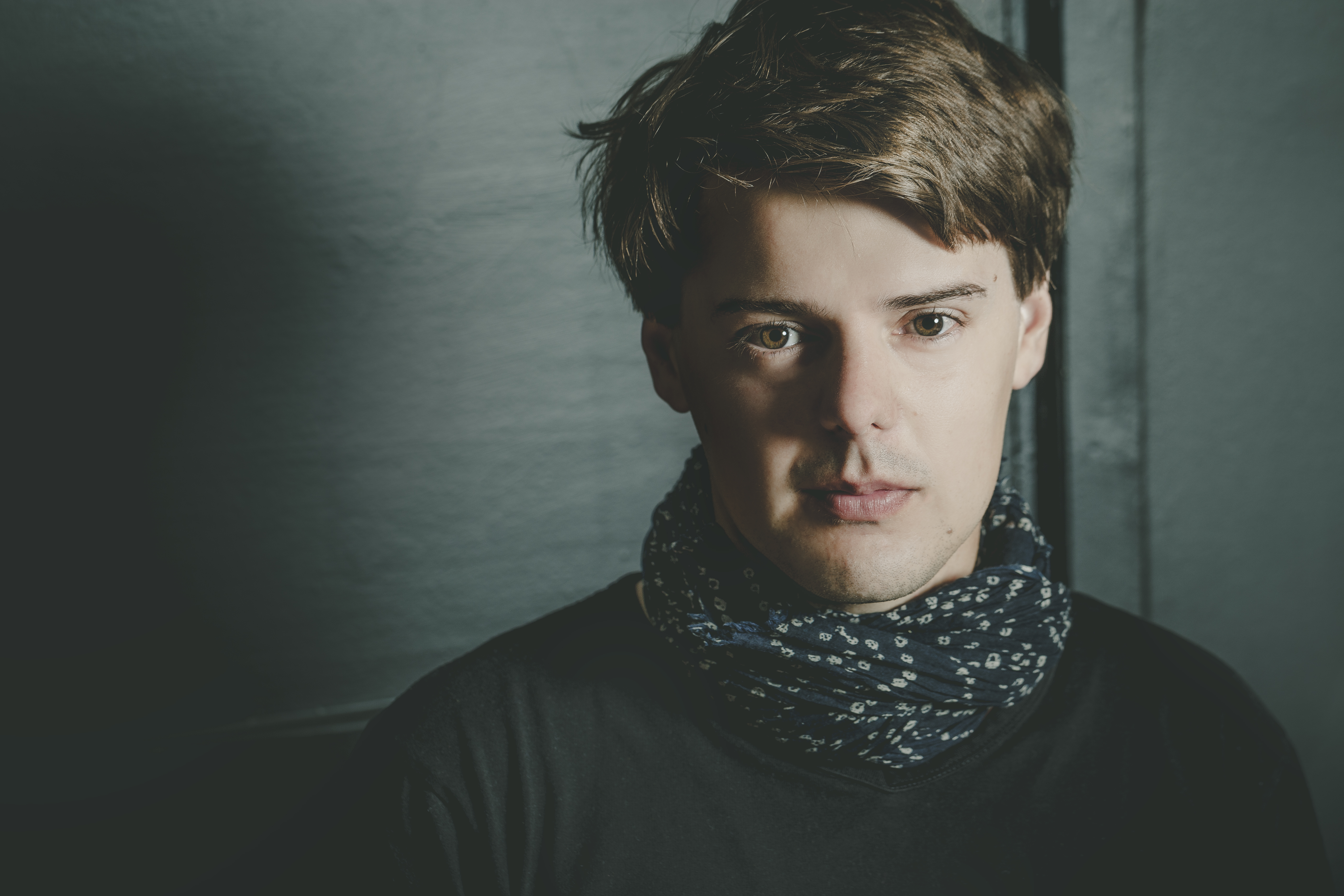 Priit Strandberg (2016) foto: Maris Savik